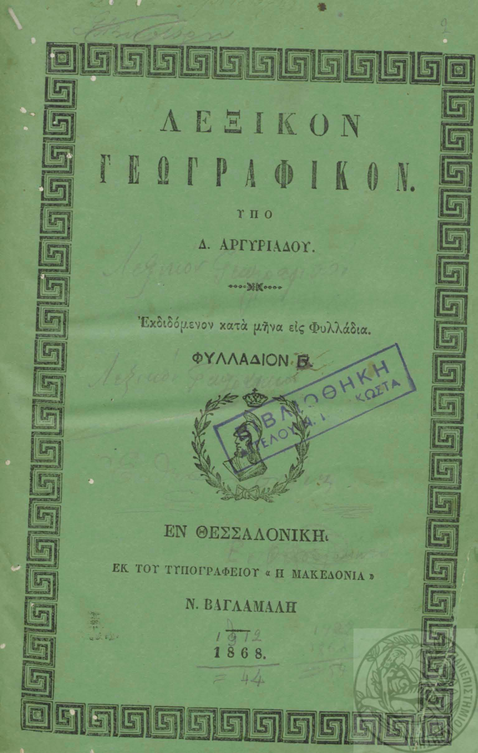 Λεξικόν Γεωγραφικόν /Υπό Δ. Αργυριάδου. Εν Θεσσαλονίκη: Εκ του τυπογραφείου «Η Μακεδονία» N. Βαγλαμάλη, 1868